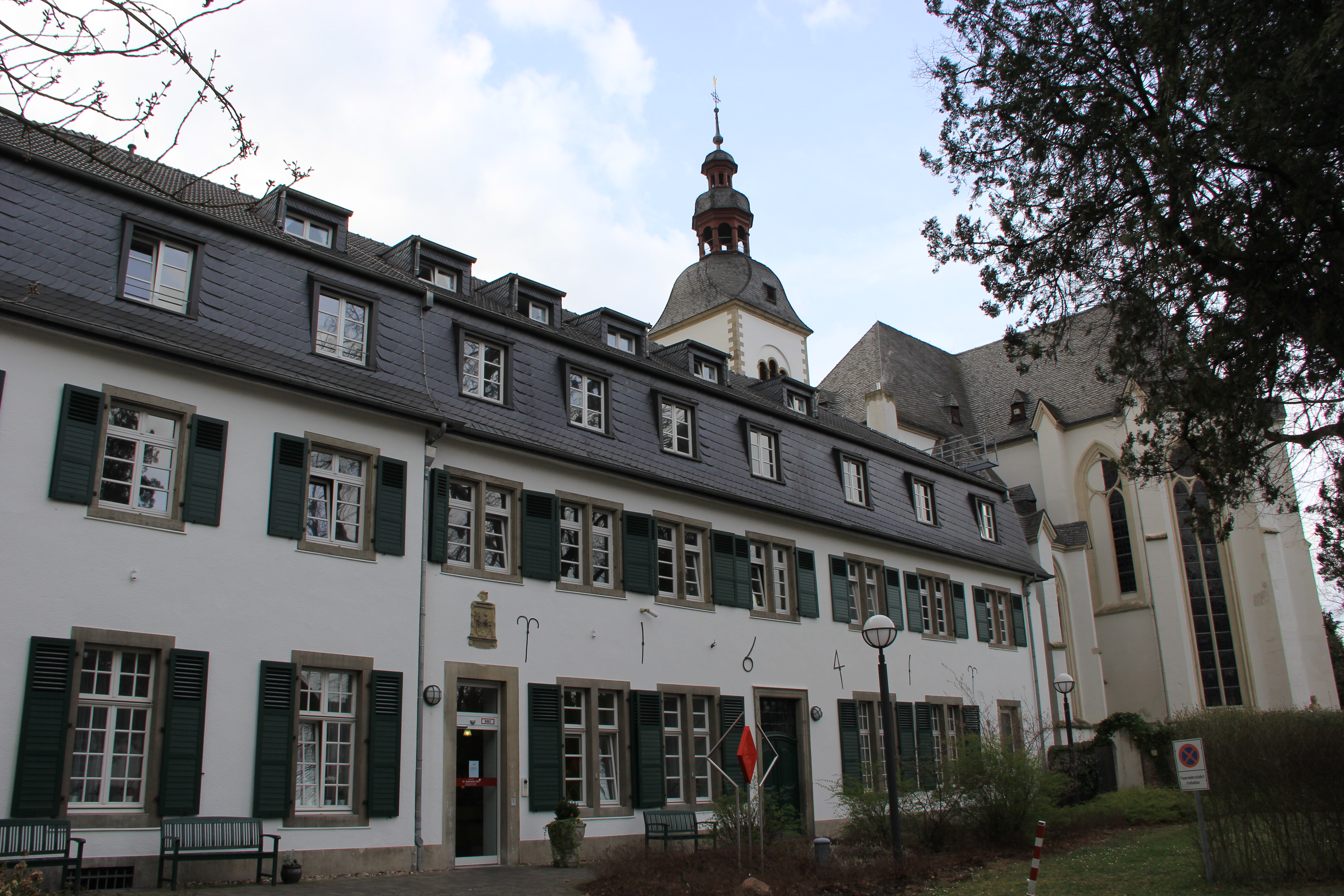 Vilich; Adelheidisstift, gegründet 978. Die erste Äbtissin war die heilige Adelheid.